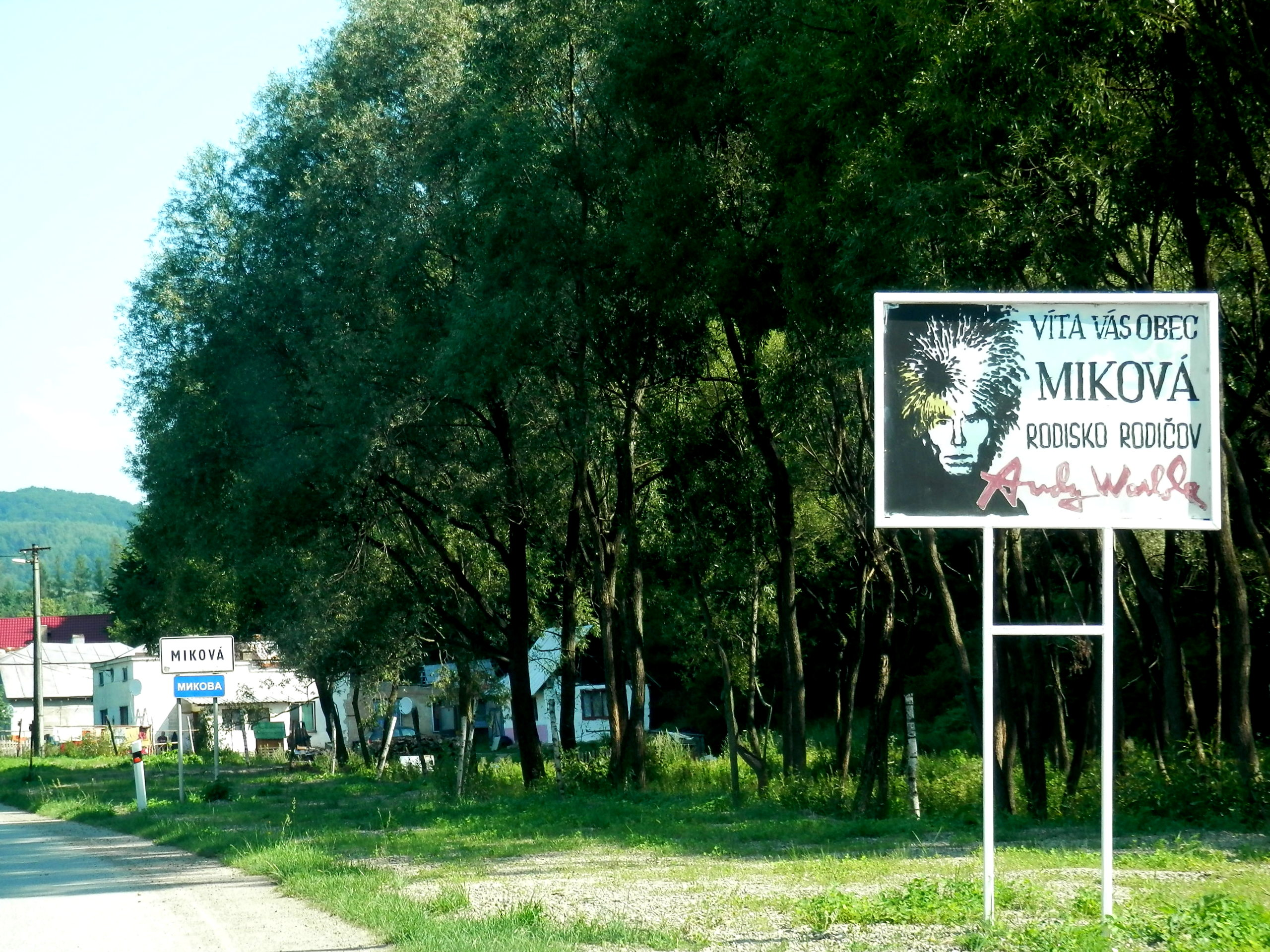 Obec Miková, sa v archívnych písomnostiach po prvý raz spomína v roku 1390. Historicky patrí do regiónu Šariš, územno-správne do Prešovského kraja. V súčasnosti v nej žije takmer 170 obyvateľov. Je rodiskom rodičov svetového moderného maliara Andyho Warhola. Málo známou raritou je, že v obci Miková sa od roku 1913 do roku 1951 ťažila ropa. Celkovo bolo v Mikovej vyvŕtaných sedemnásť vrtov v hĺbke 50 až 250 metrov.